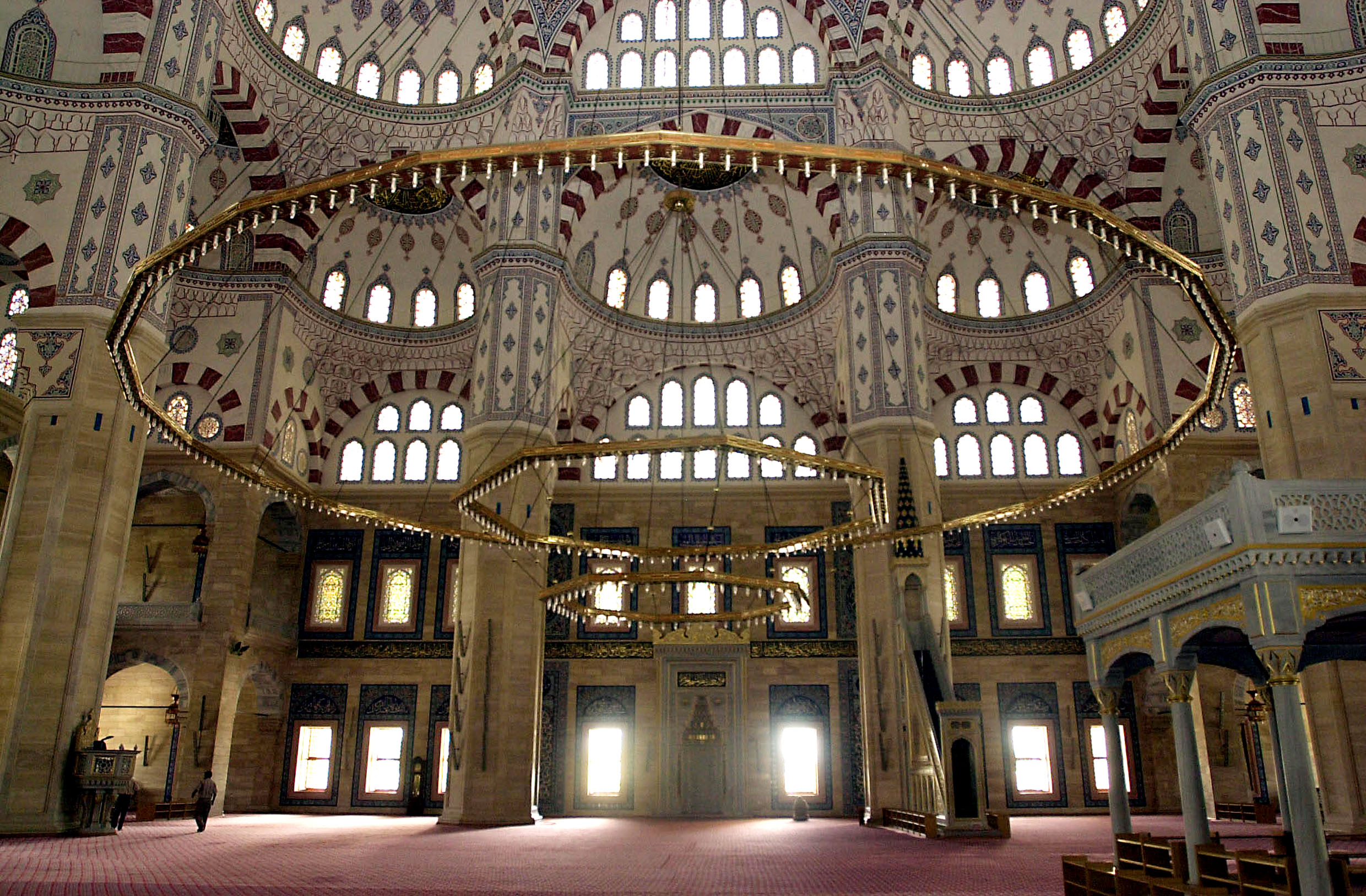 Adana, Turquia - Vista do interior da Mesquita Sabanc Merkez Camii, na cidade de Adana na turquia, onde os brasileiros vindos das regiões de conflito no Líbano, aguardam transporte para retornarem ao Brasil. Foto: Marcello Casal Jr/ABr